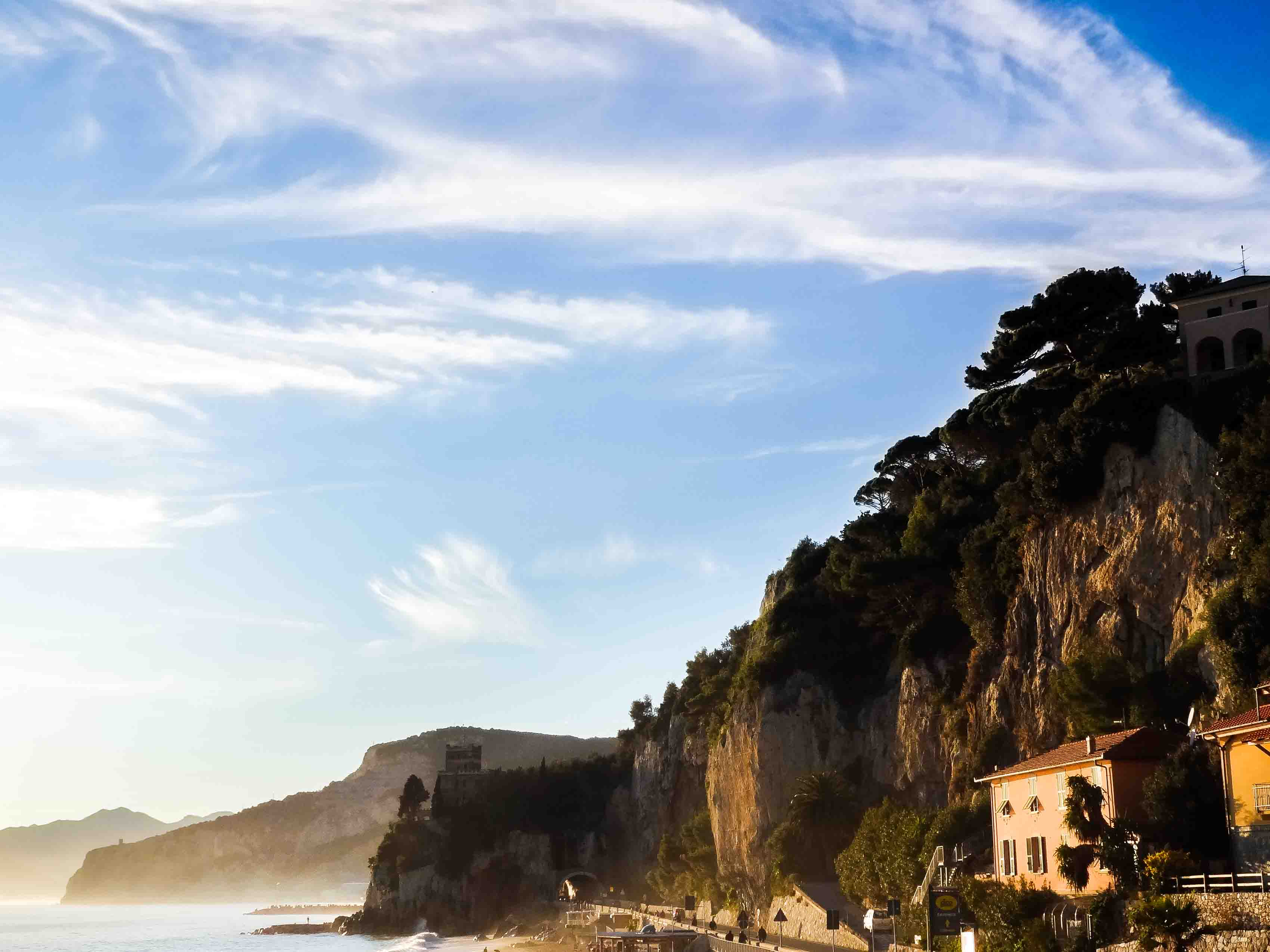 Molo di Finale Ligure al tramonto.